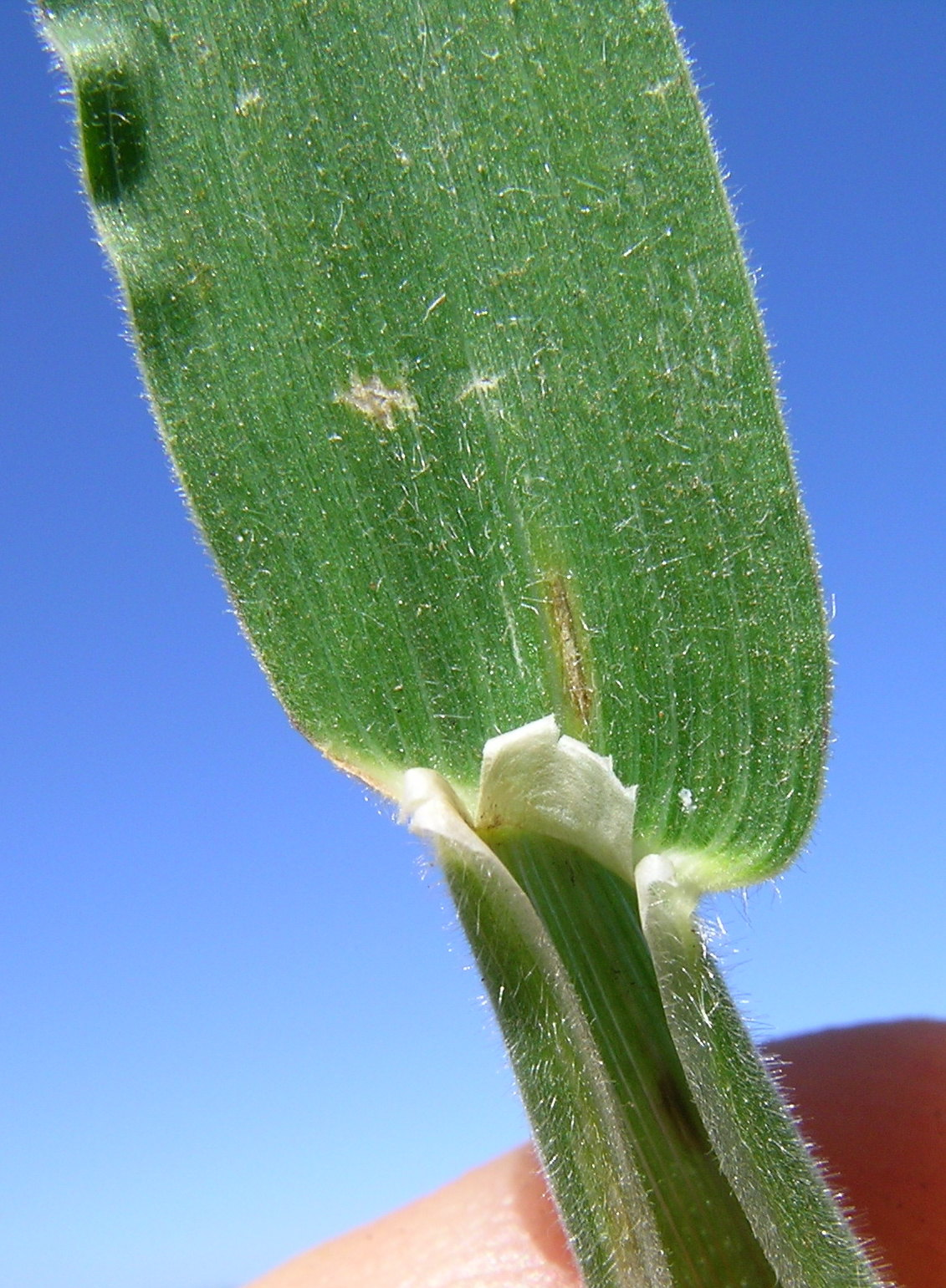 Ligule is membranous